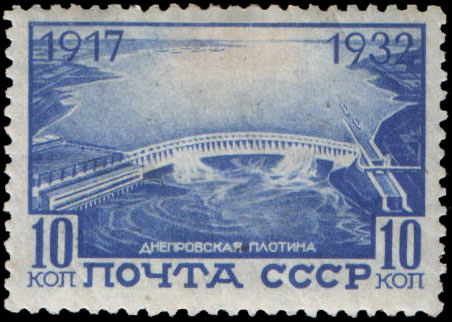 Почтовая марка СССР - Днепрогэс